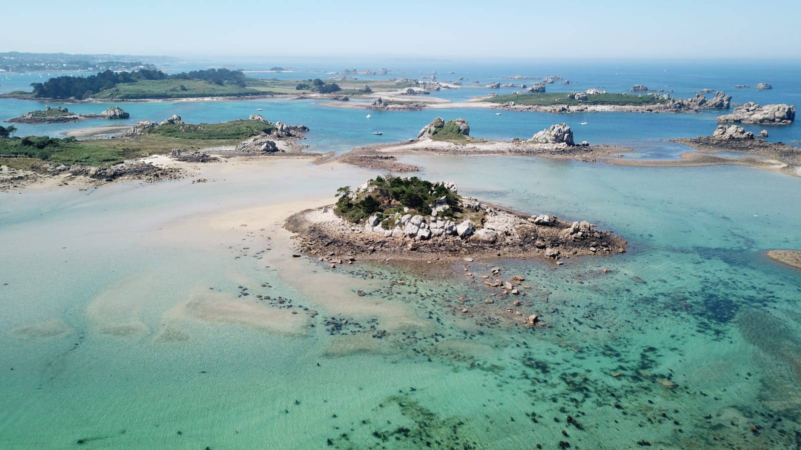 Les îles de Buguélès vues du sillon de galets d'Illiec